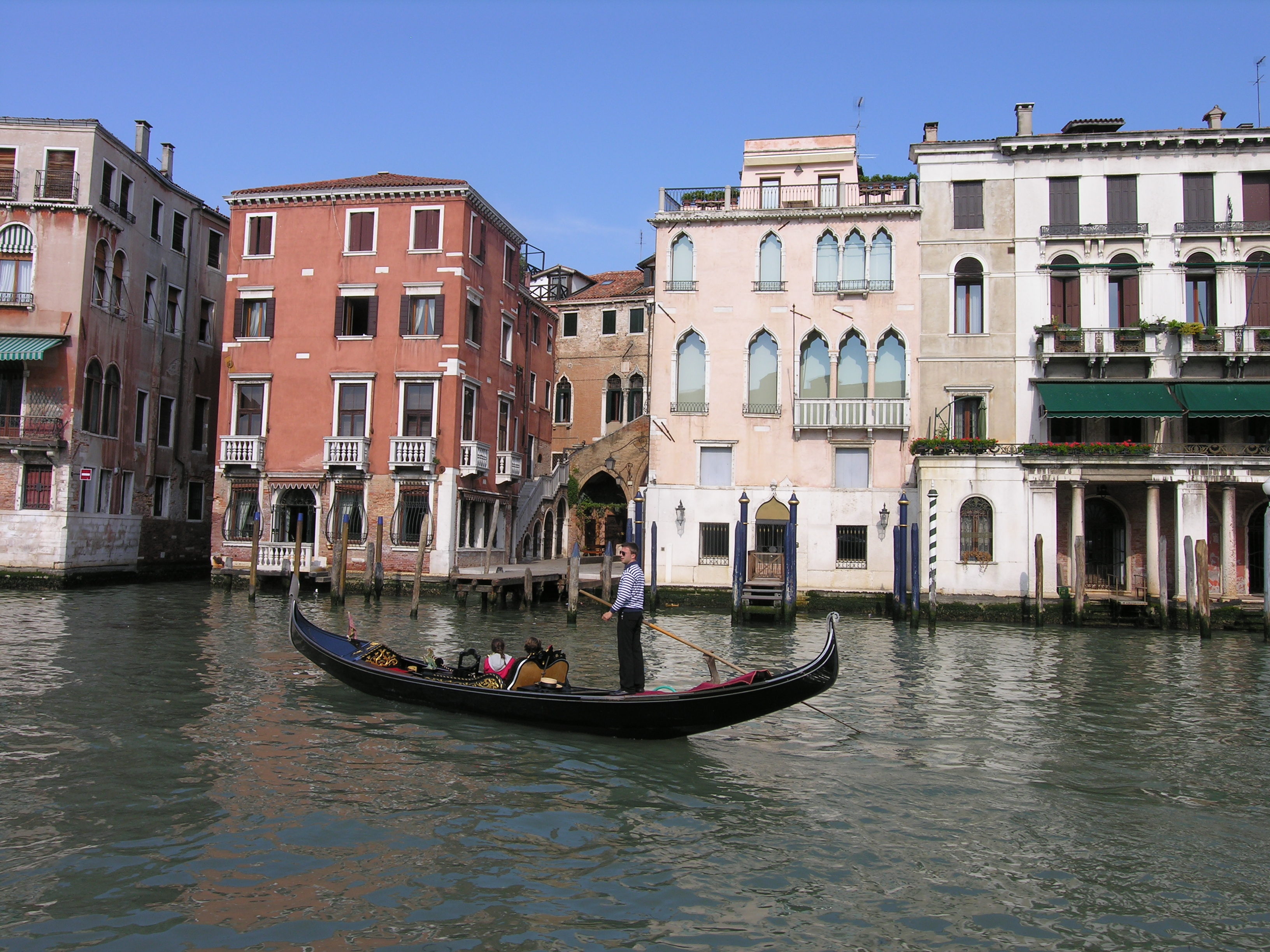 San Polo, 30100 Venice, Italy